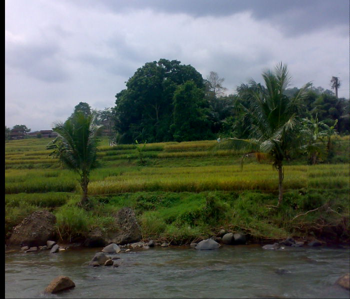 Kuburan Raden Prawatasari di tepi Sungai Cibeet